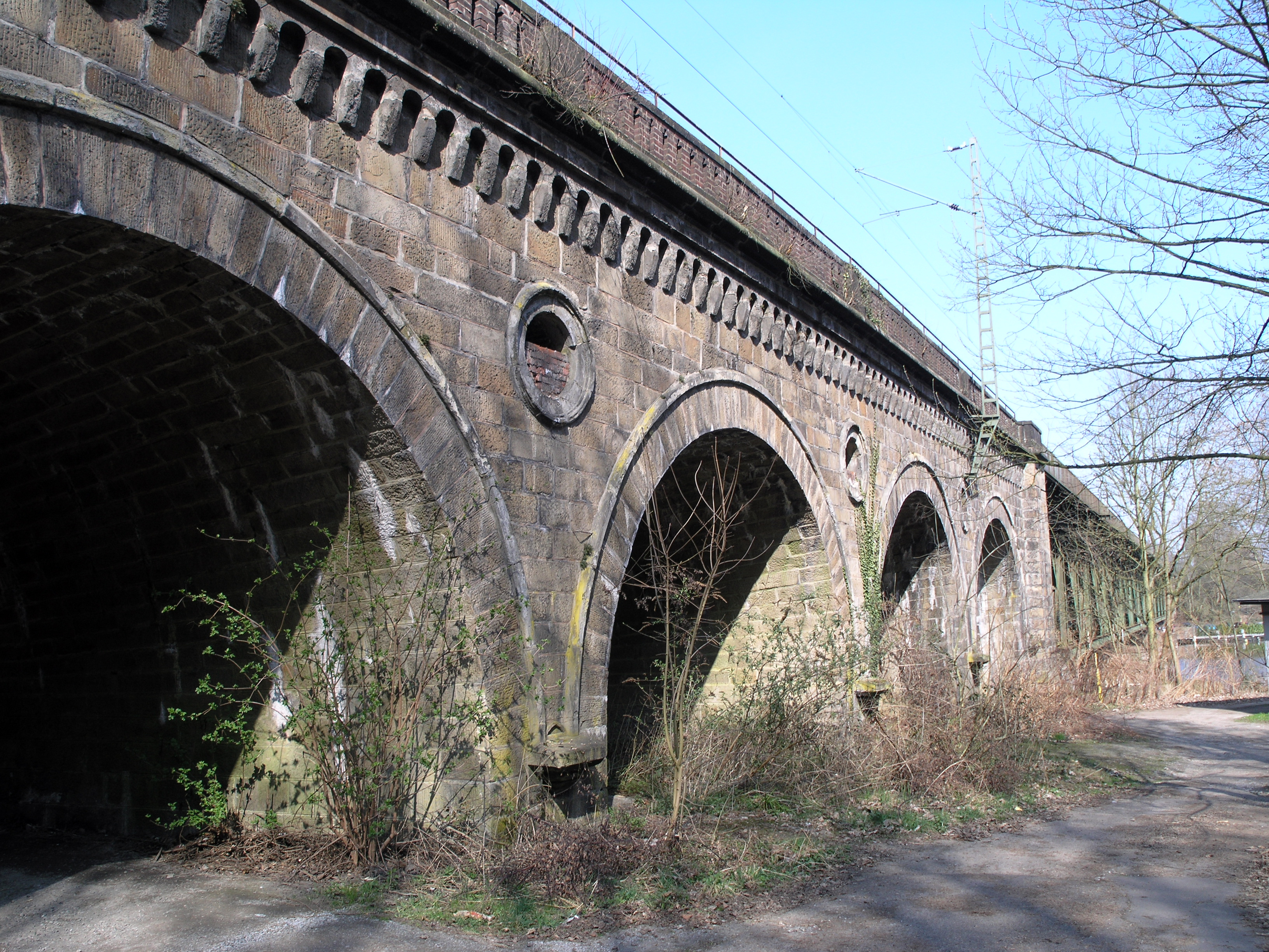 Северный Рейн-Вестфалия, Эссен - кеттвигский железнодорожный мост